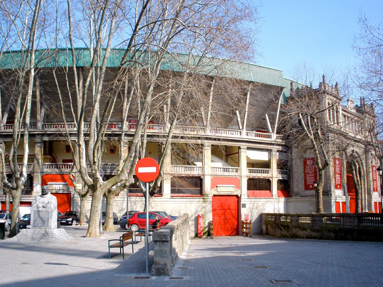 Pamplona - Plaza de Toros